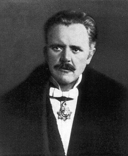 Buttykay Ákos magyar zeneszerző